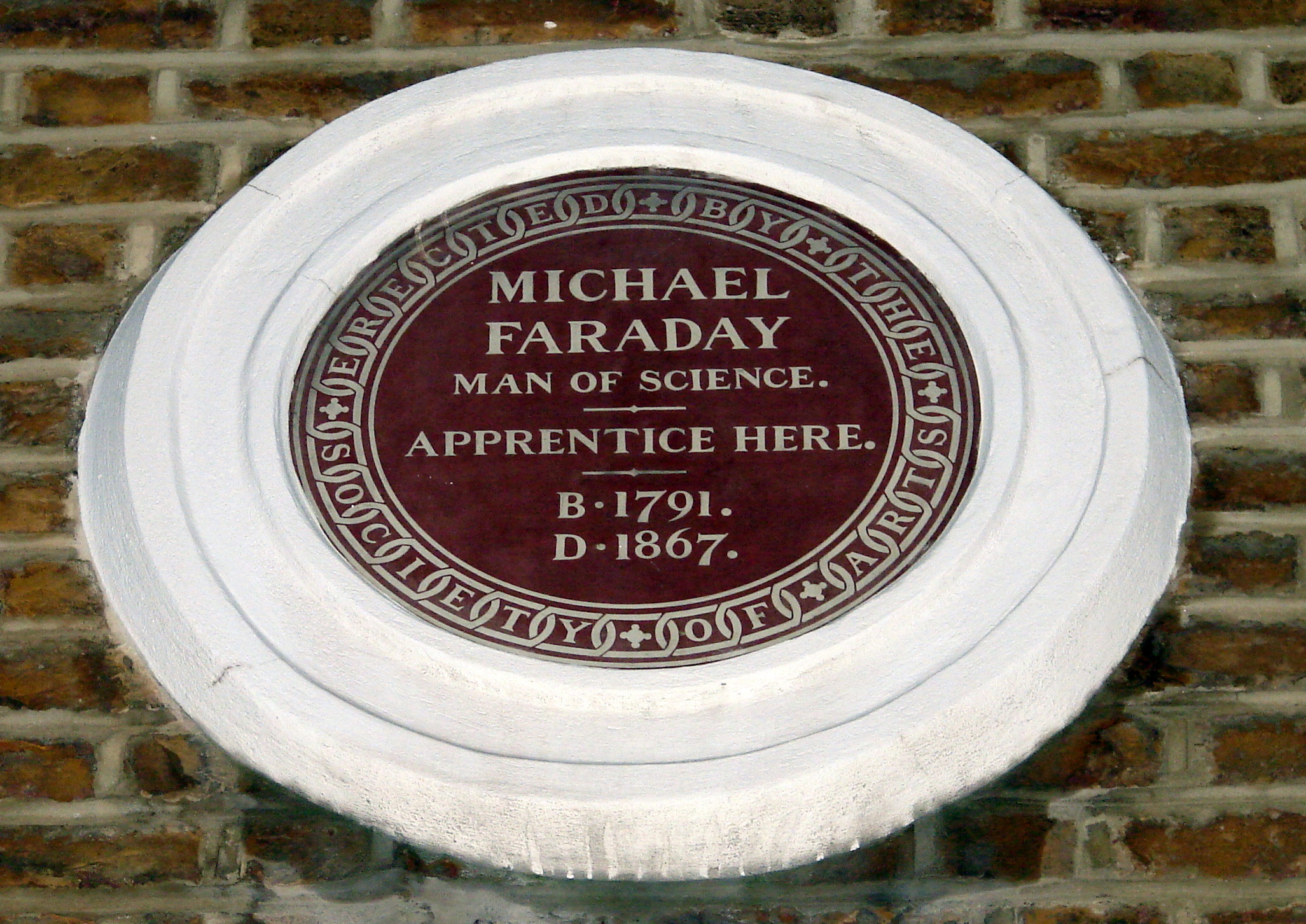 Michael Faraday plaque